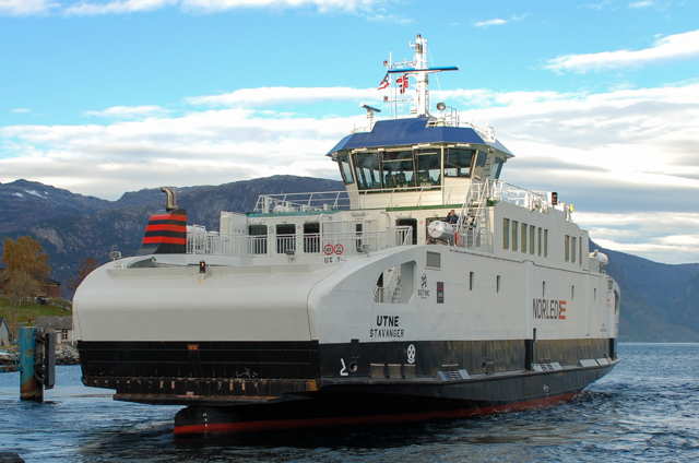 MF "Utne" på vei frå Utne til Kvanndal